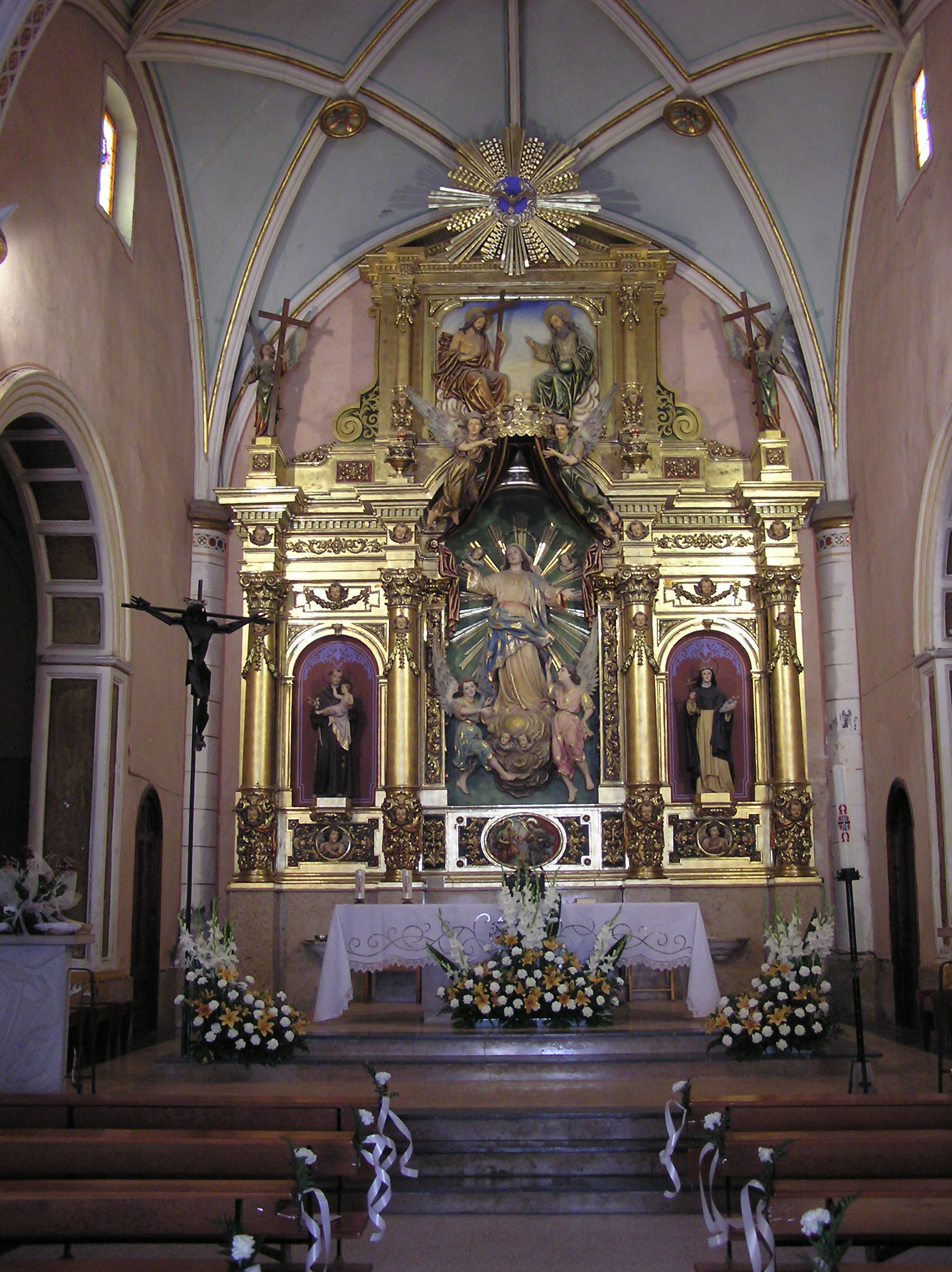 Retablo y nave central de la iglesia parroquial de Xerta.